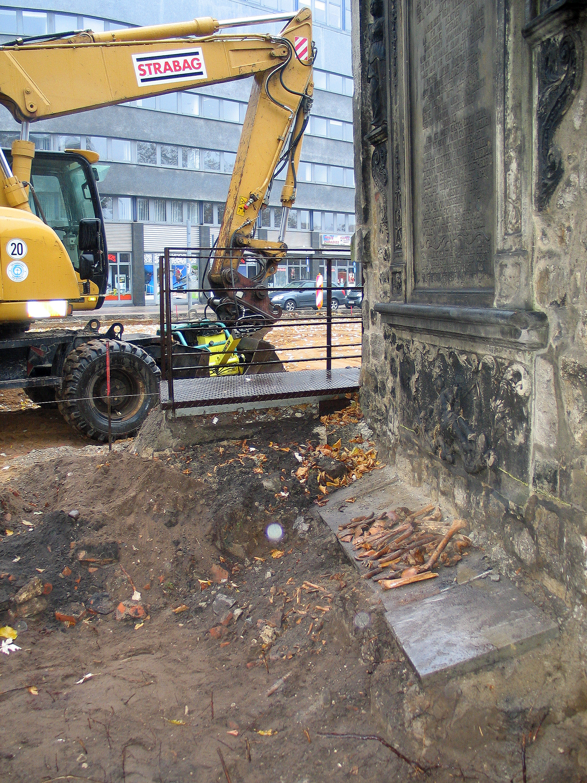 Anhäufung der Schädelknochen und Gebeine an der Nikolaikapelle durch den Bauhistoriker Sid Auffarth ...